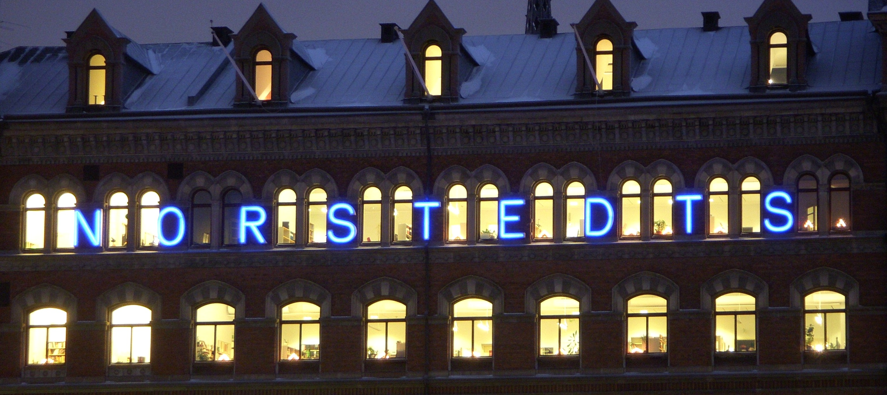 Norstedts förlag Riddarholmen, Stockholm